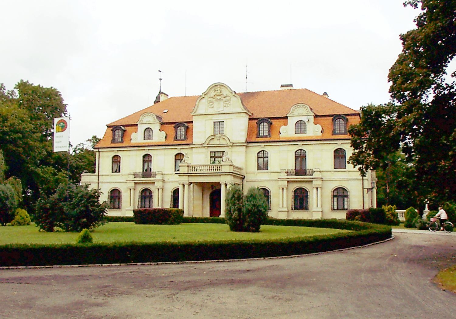 Smolice, pałac